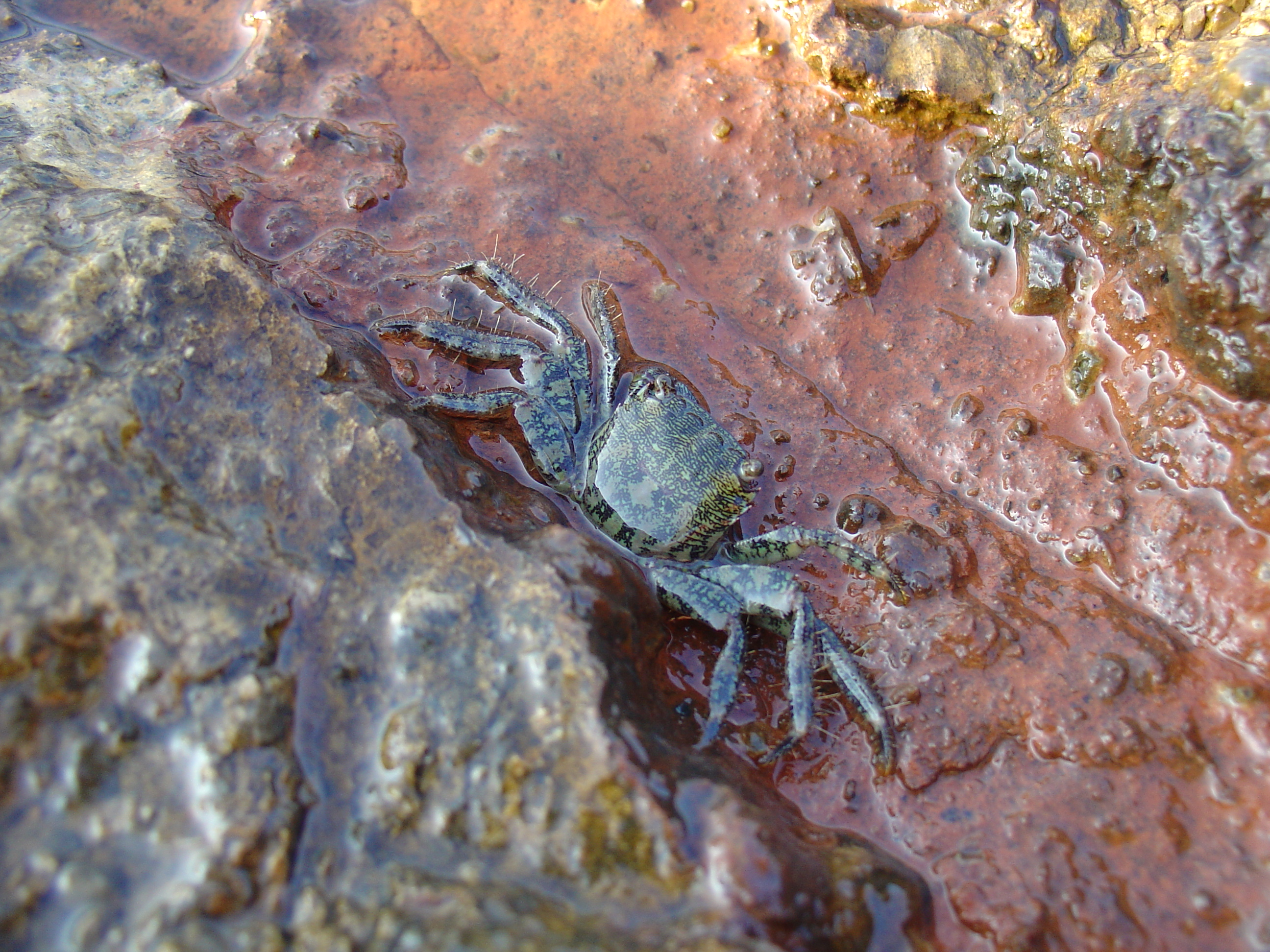 Pachygrapsus marmoratus, cangrejo corredor, fotografiado en 'Los secos', Cabo Palos, Murcia, Spain